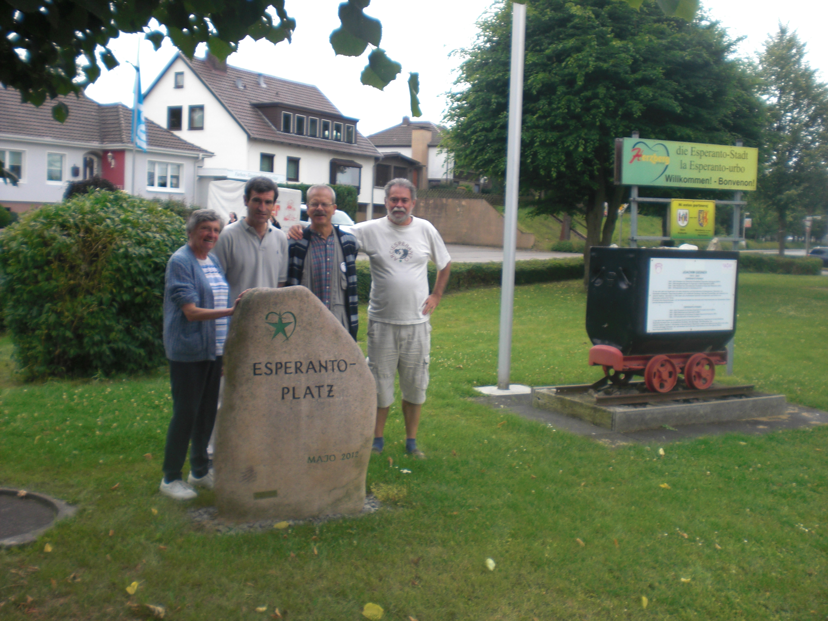 Esperanto monumento antaux stacio de Hercbergo